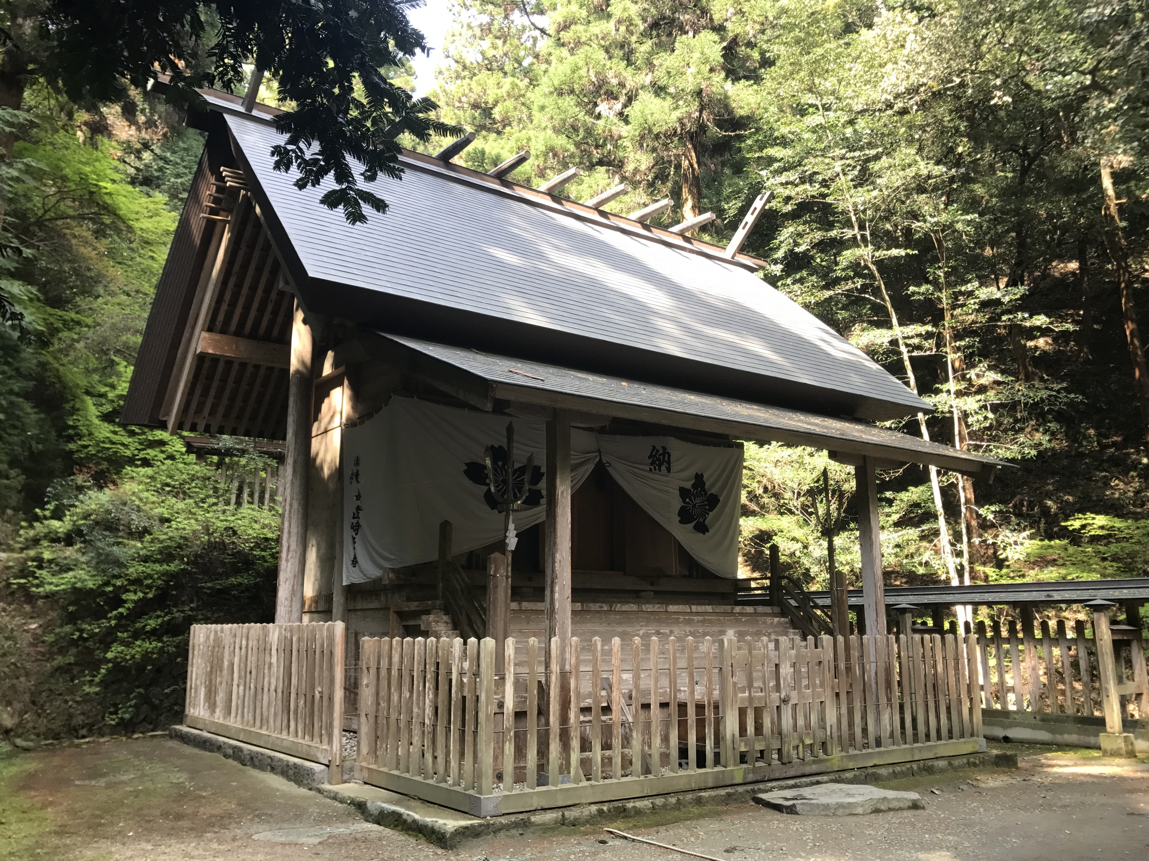 伊野天照皇大神宮の神殿